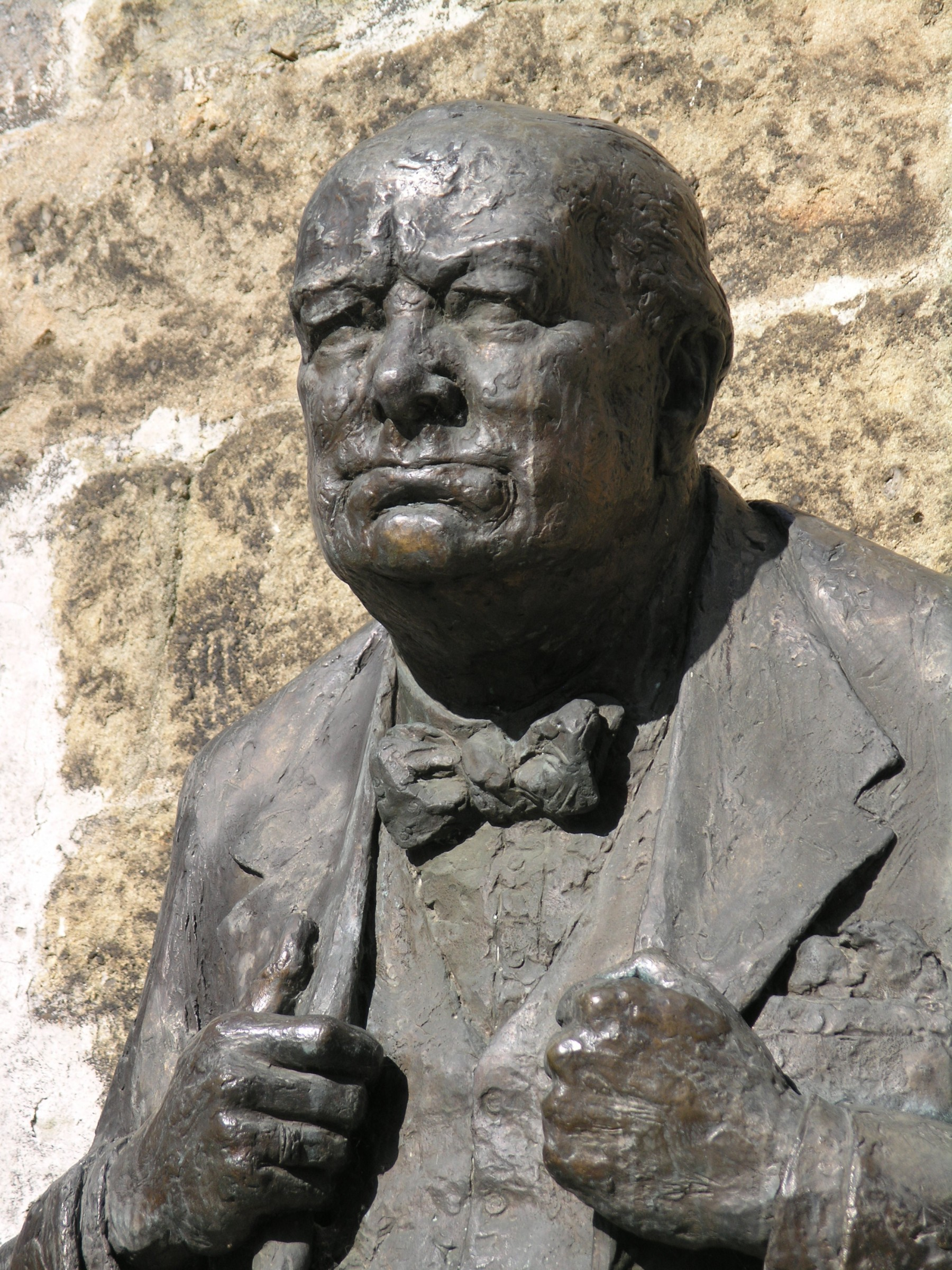 Praha, Malá Strana - detail busty Winstona Churchilla v Thunovské ulici před Britskou ambasádou